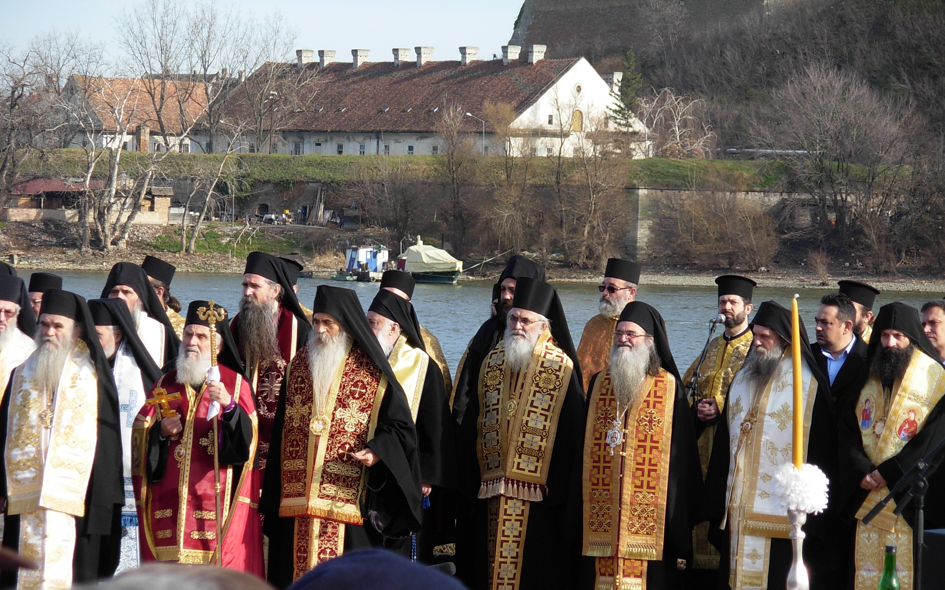 Predstavnici SPC na obeležavanju 70. godišnjice Novosadske racije.